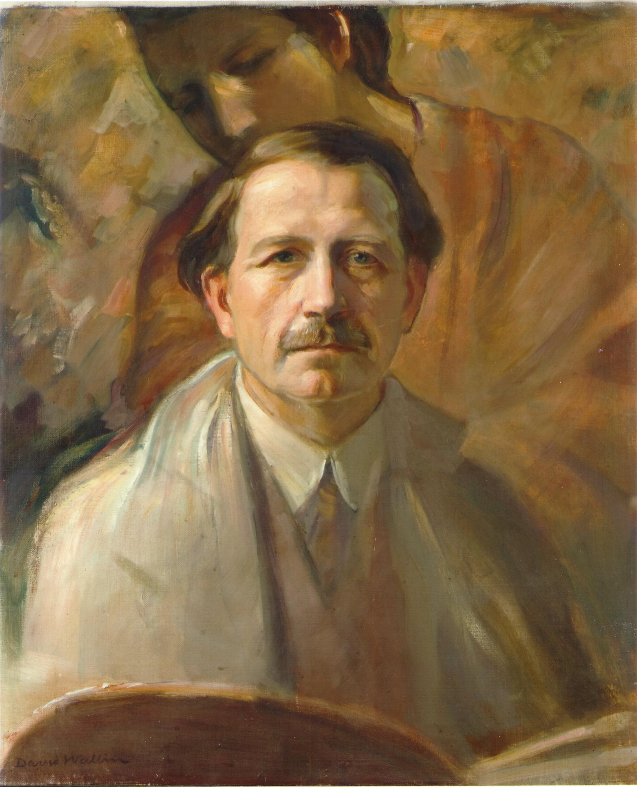 Self-portrait